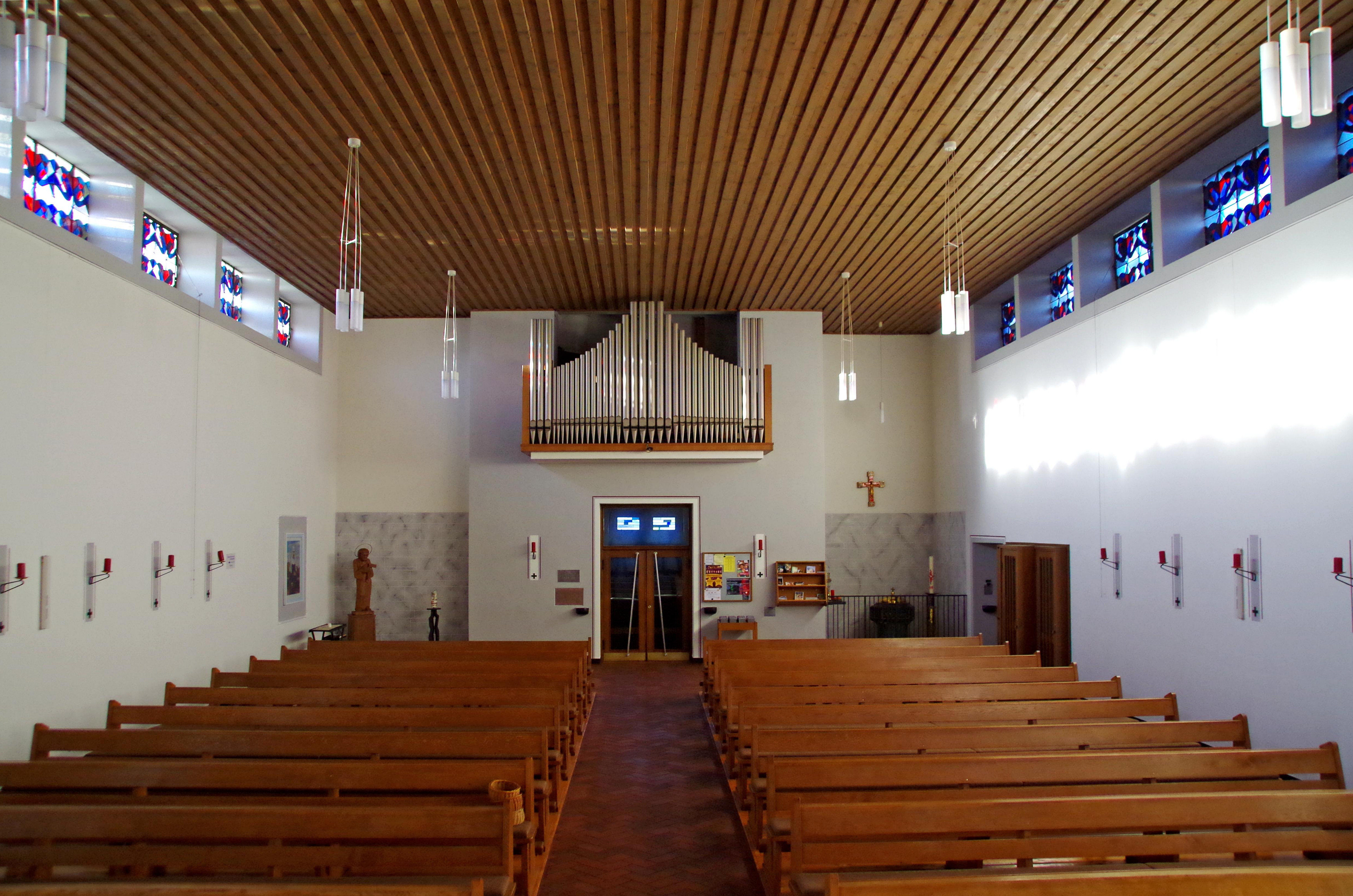 St. Mariä Empfängnis (Rollesbroich), Blick vom Altar zur Orgel